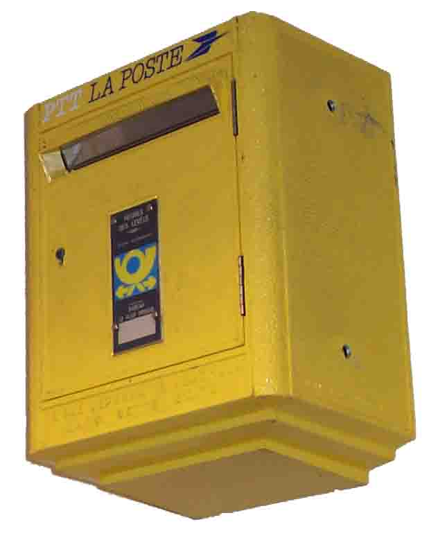 französischer Postbriefkasten von La Poste, welcher aber ein Geschenk an eine deutsche (momentan unbekannte) Stadt war und deshalb von der Deutschen Bundespost eingesetzt wurde (Begründung: gelbes deutsches Posthorn auf blauem Grund in der Briefkastenmitte) Aufnahmeort: Rheinhessisches Postmuseum in Erbes-Büdesheim, Deutschland